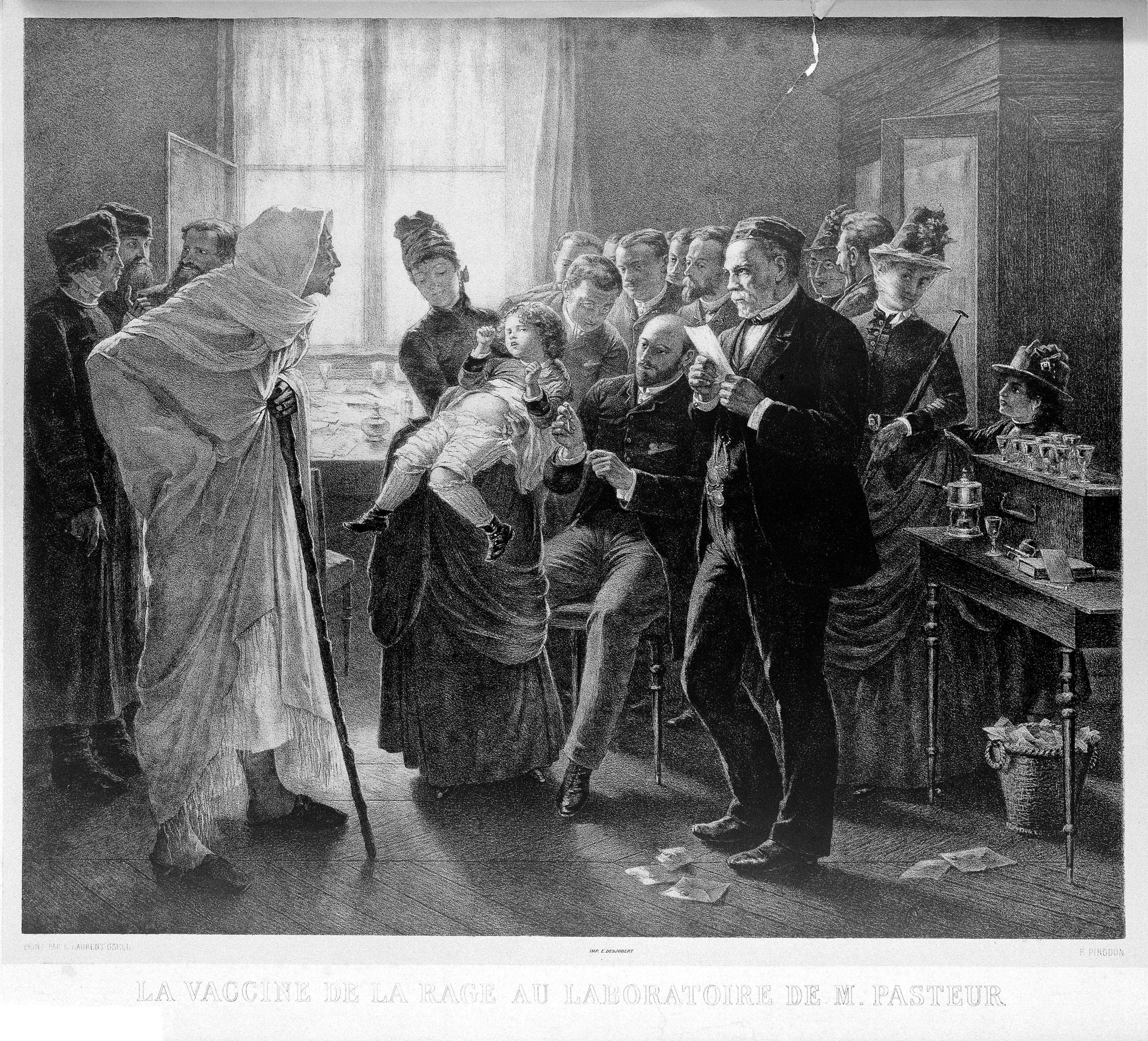 Rabies vaccination in Pasteur's clinic in Paris. Lithograph by F. Pirodon after L.-L. Gsell. Wellcome Images Keywords: rabies: prevention; Louis Pasteur; Jacques-Joseph Grancher; Eugène Viala; Laurent-Lucien Gsell; Laurent Gsell